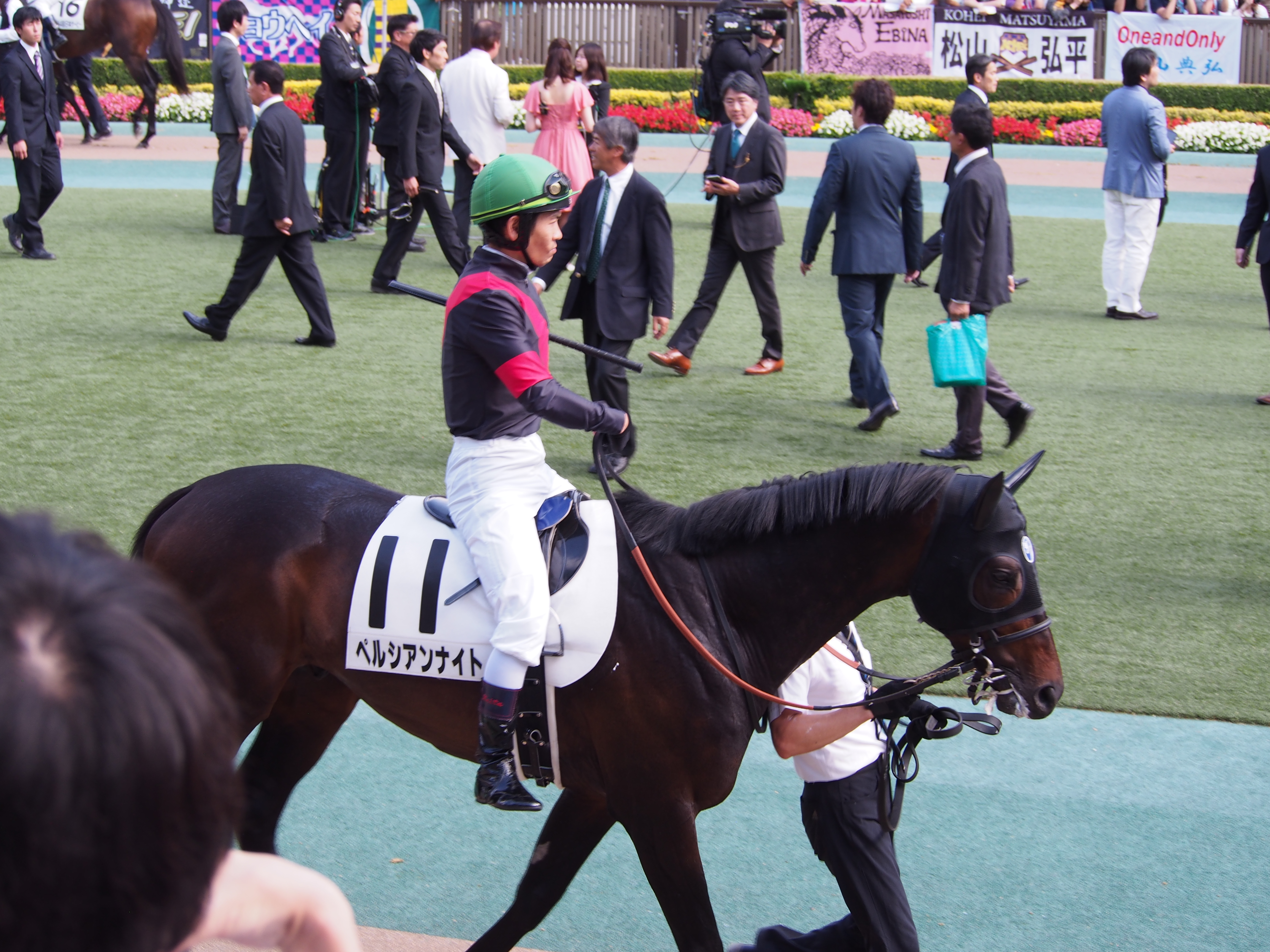 10R Tokyo Yushun Japanese Derby 東京優駿(日本ダービー)